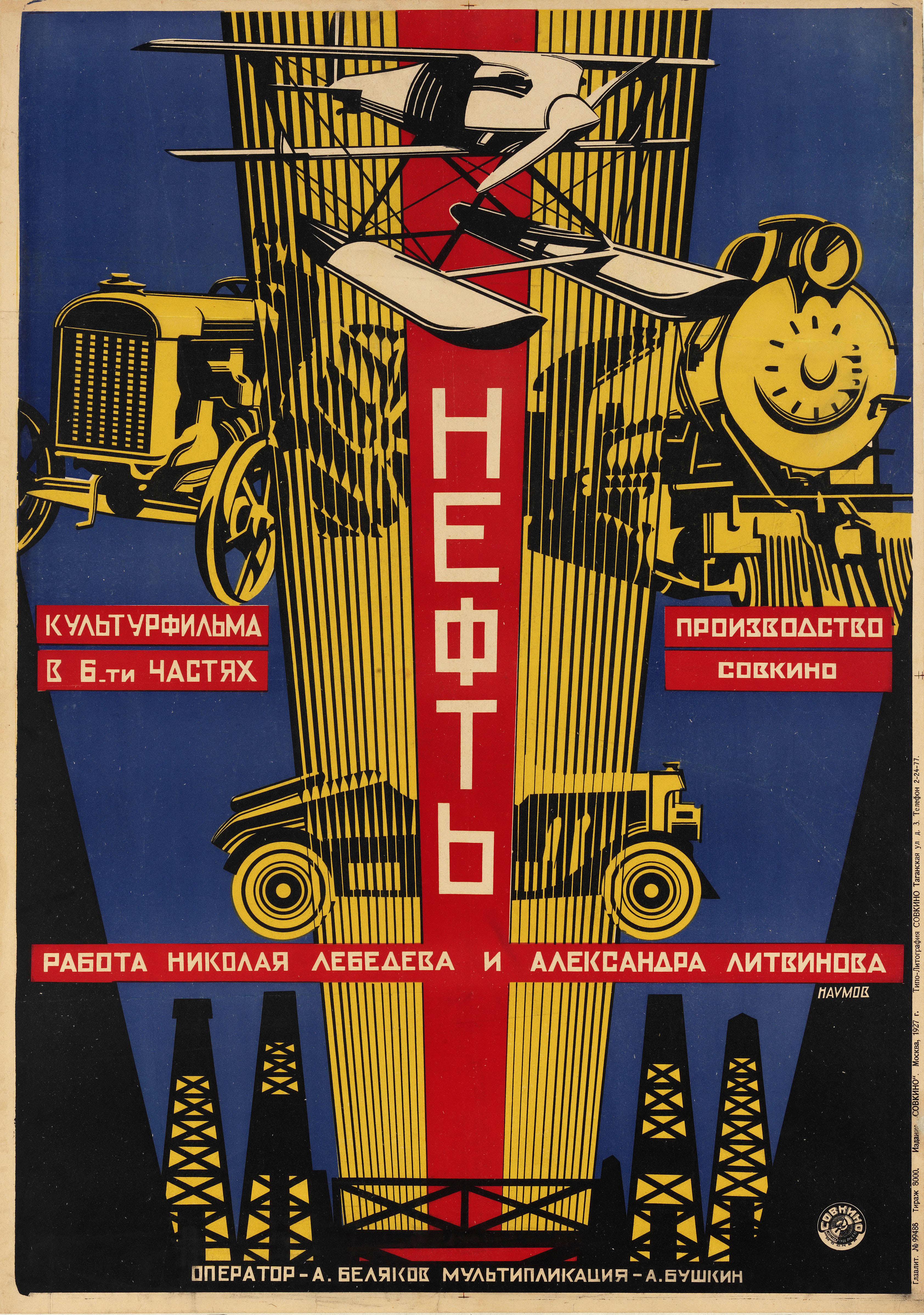 Плакат к советскому документальному фильму «Нефть». Москва: Издание Совкино, 1927. Хромолитография, 107×70 см. Тираж. 8000 экз.